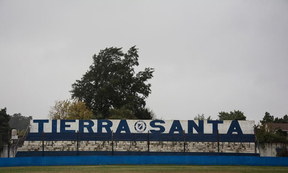 Tribuna popular del Estadio Francisco Boga, de San Martín de Burzaco.